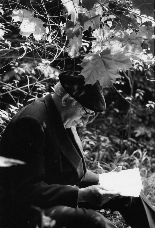 Maurice Carême, l'été 1969 à Orval dans le Bois le Baty